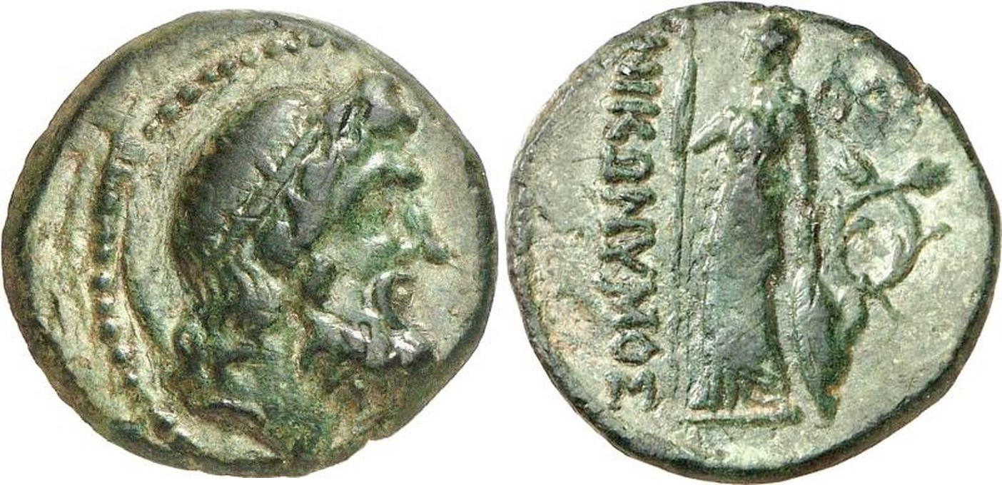 Zeus- Athena, Nikonymos, 60 – 40 v.